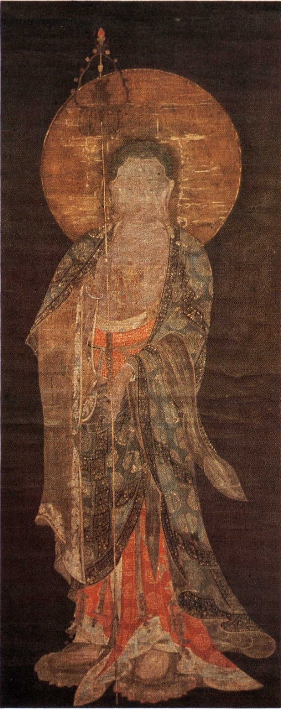 지장보살입상.